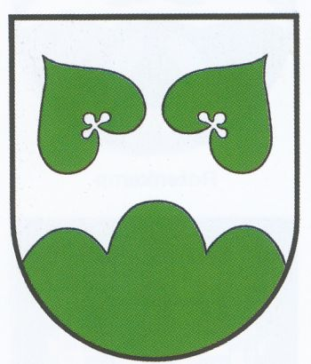 Wappen van de Dörp Sunstedt